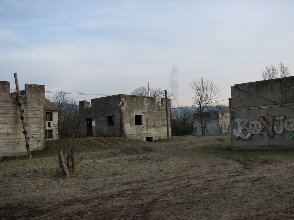 ruines militaires